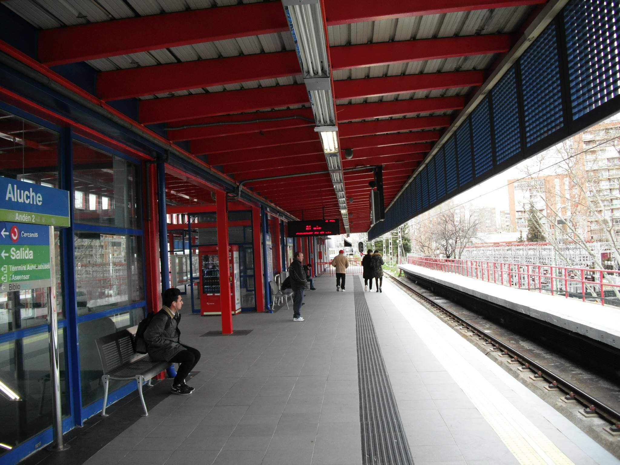 Estación de Aluche (Metro de Madrid)